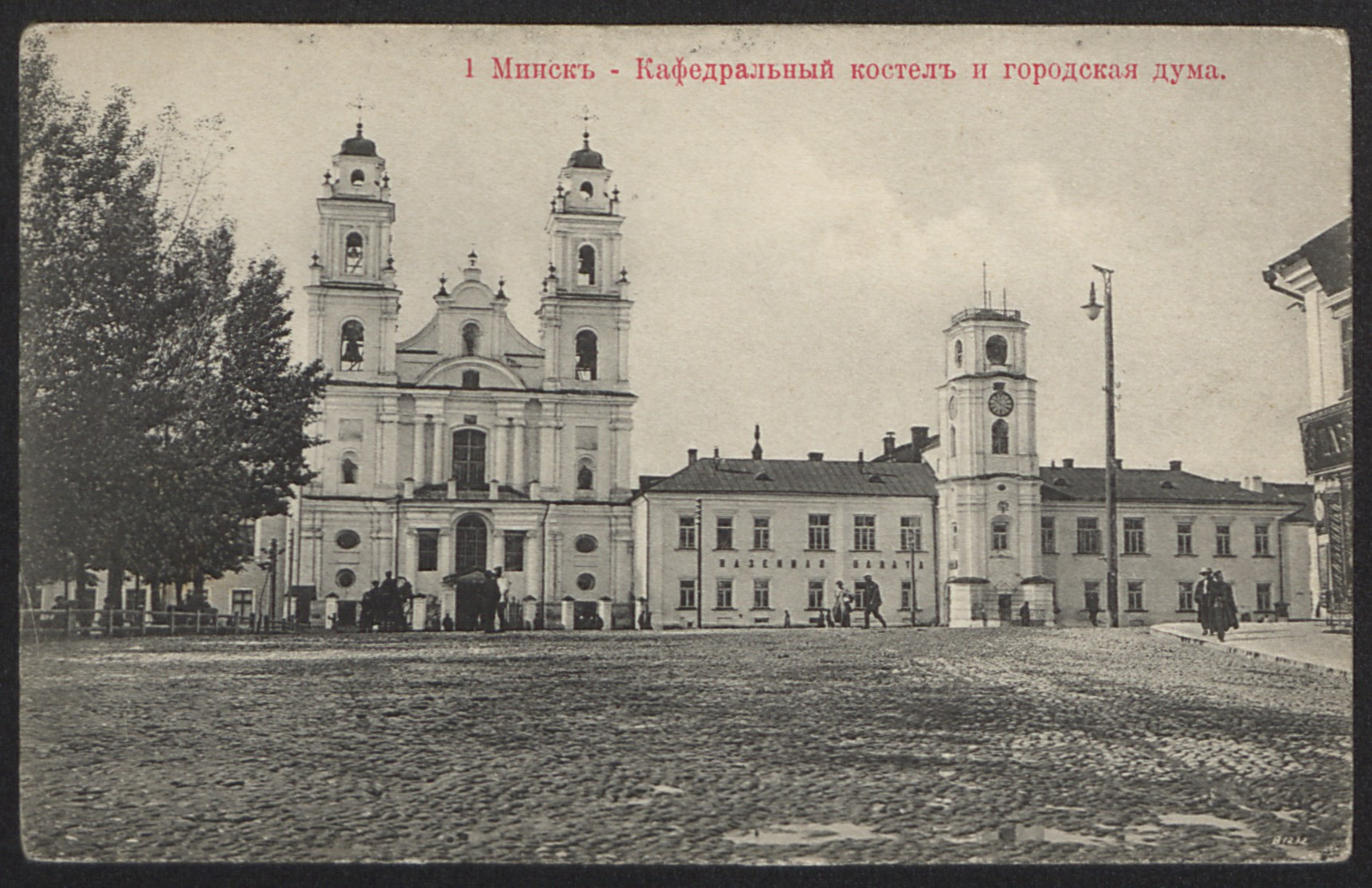 Беларуская (тарашкевіца): Менск (Miensk), пляц Высокі Рынак (plac Vysoki Rynak). Катэдральны касьцёл Імя Найсьвяцейшай Панны Марыі (Katedra) і езуіцкі калегіюм